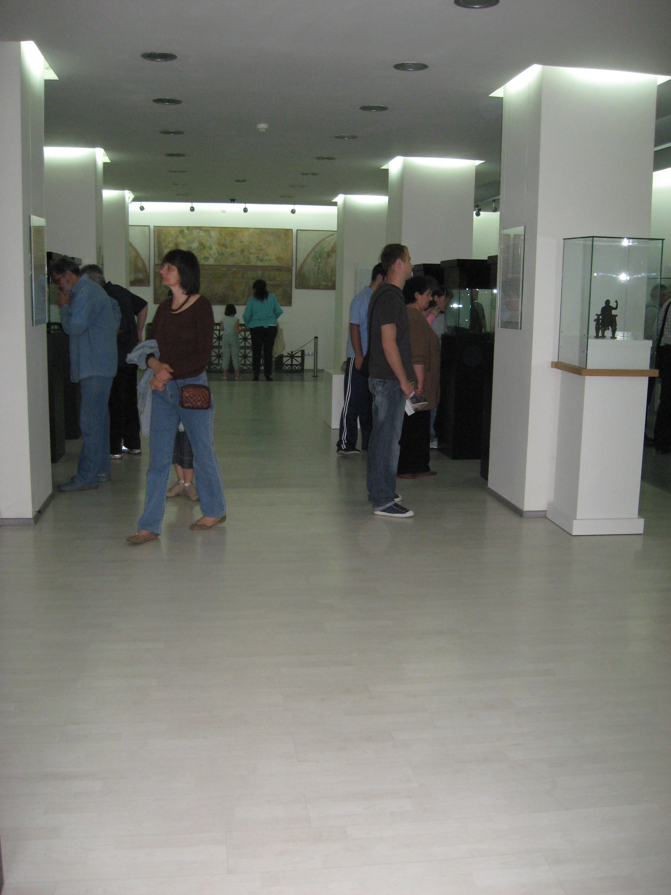 Dragan Cvetkovic Nis Noć muzeja u Nišu u Narodnom muzeju. Licensing